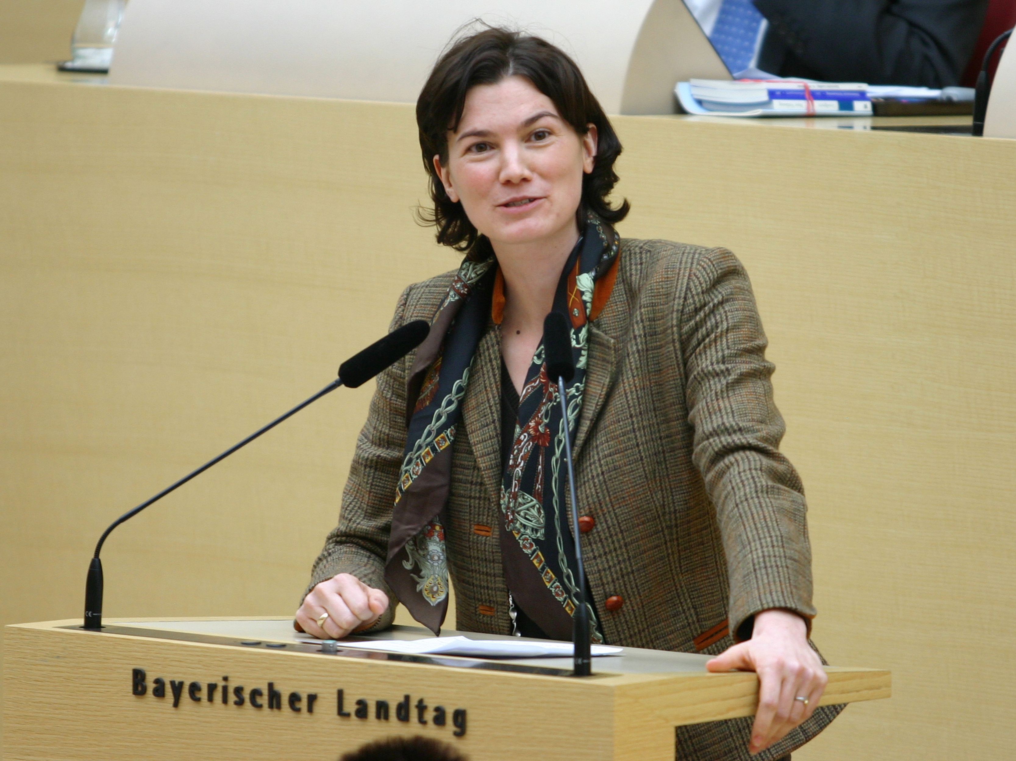 Tanja Schweiger, deutsche Politikerin (Freie Wähler), seit 2008 Abgeordnete im Bayerischen Landtag. Hier am 29. Februar 2012 bei einer Rede im Plenarsaal.